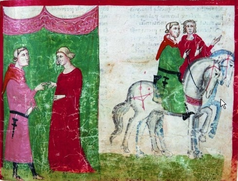 WElf V. a Matylda Toskánská - sňatek